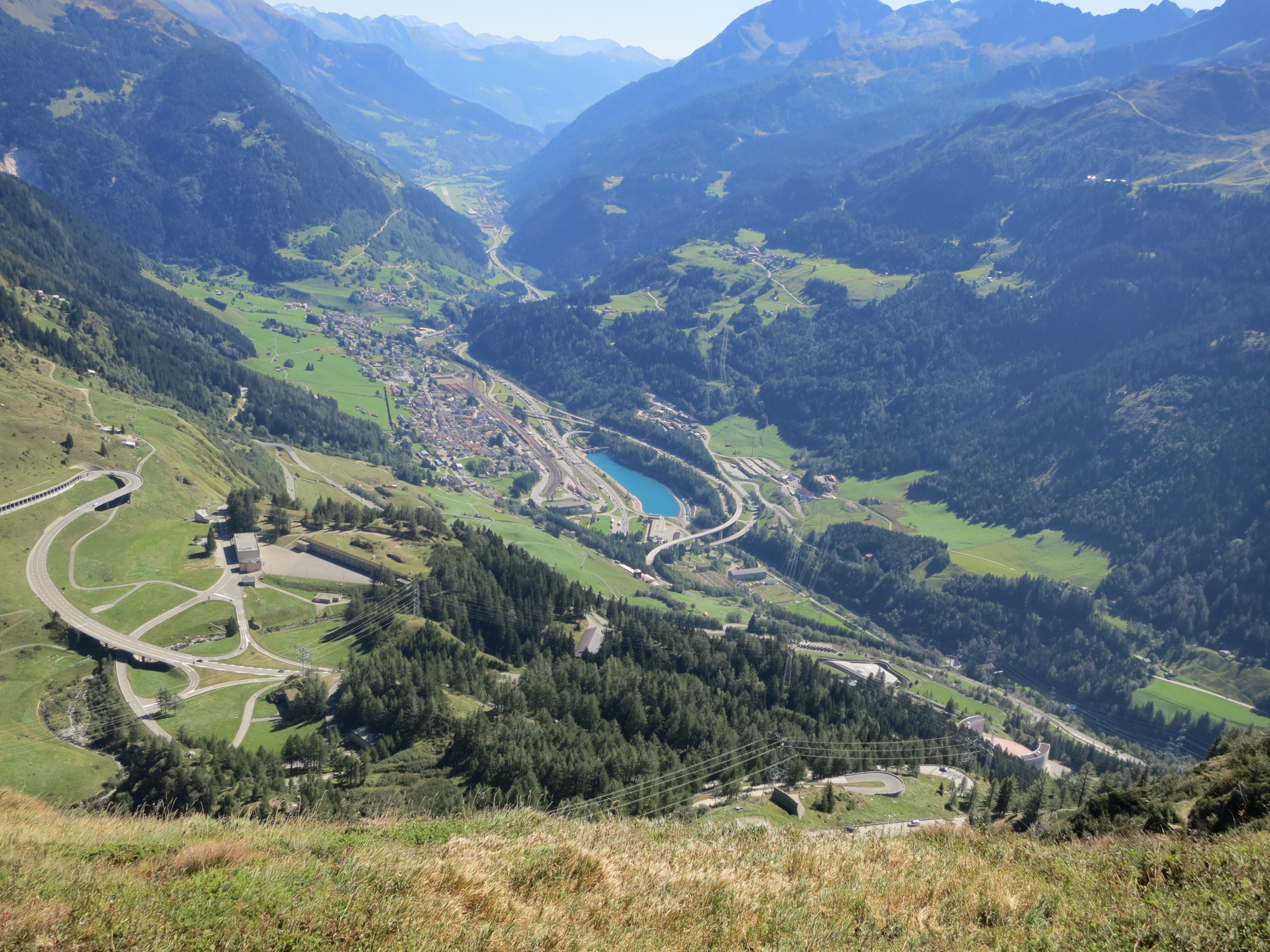 Fort Motto Bartola, Airolo, Schweiz